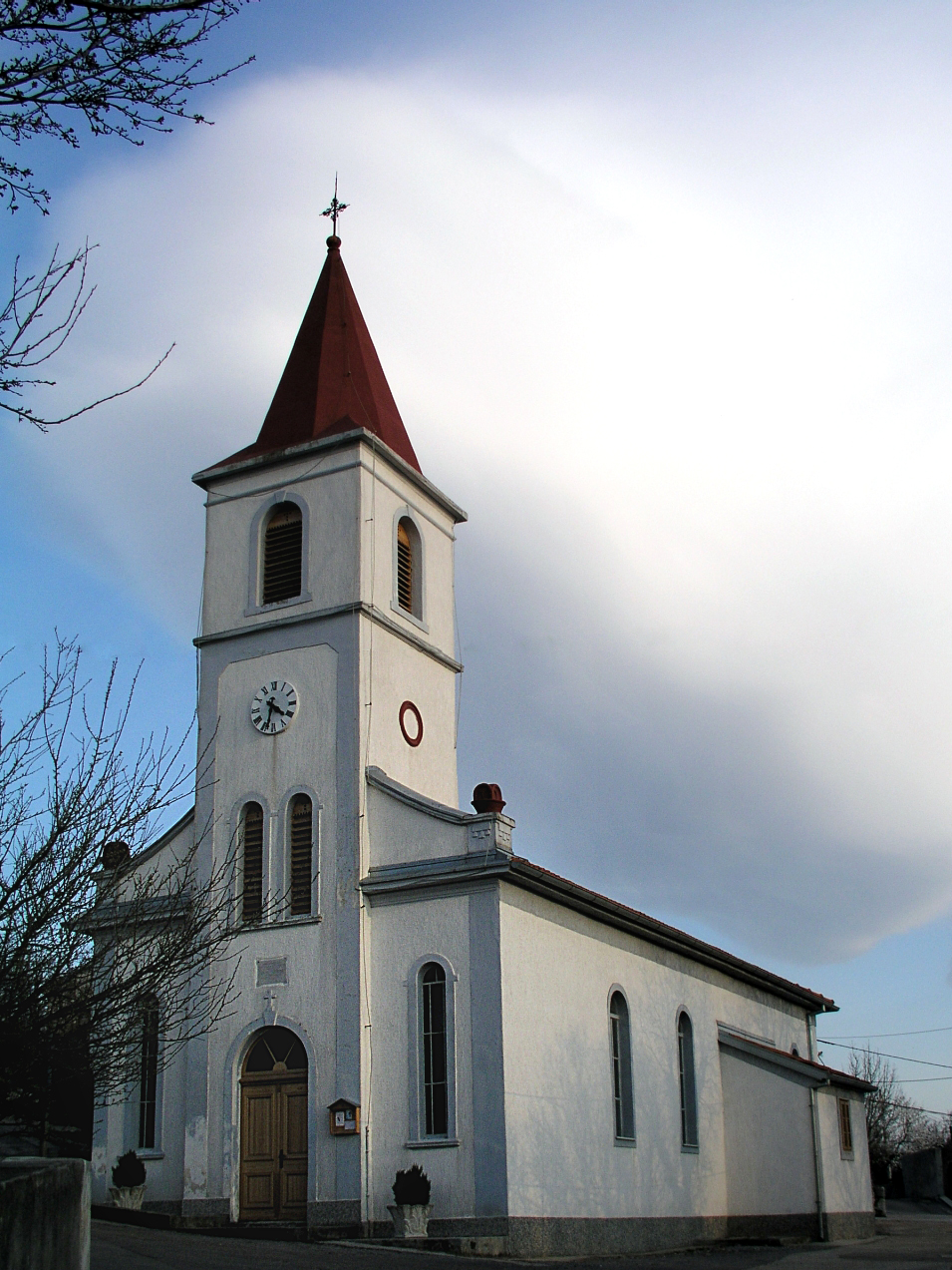 Crkva Svetog Antuna iz 1890. godine u Šmriki, Hrvatska